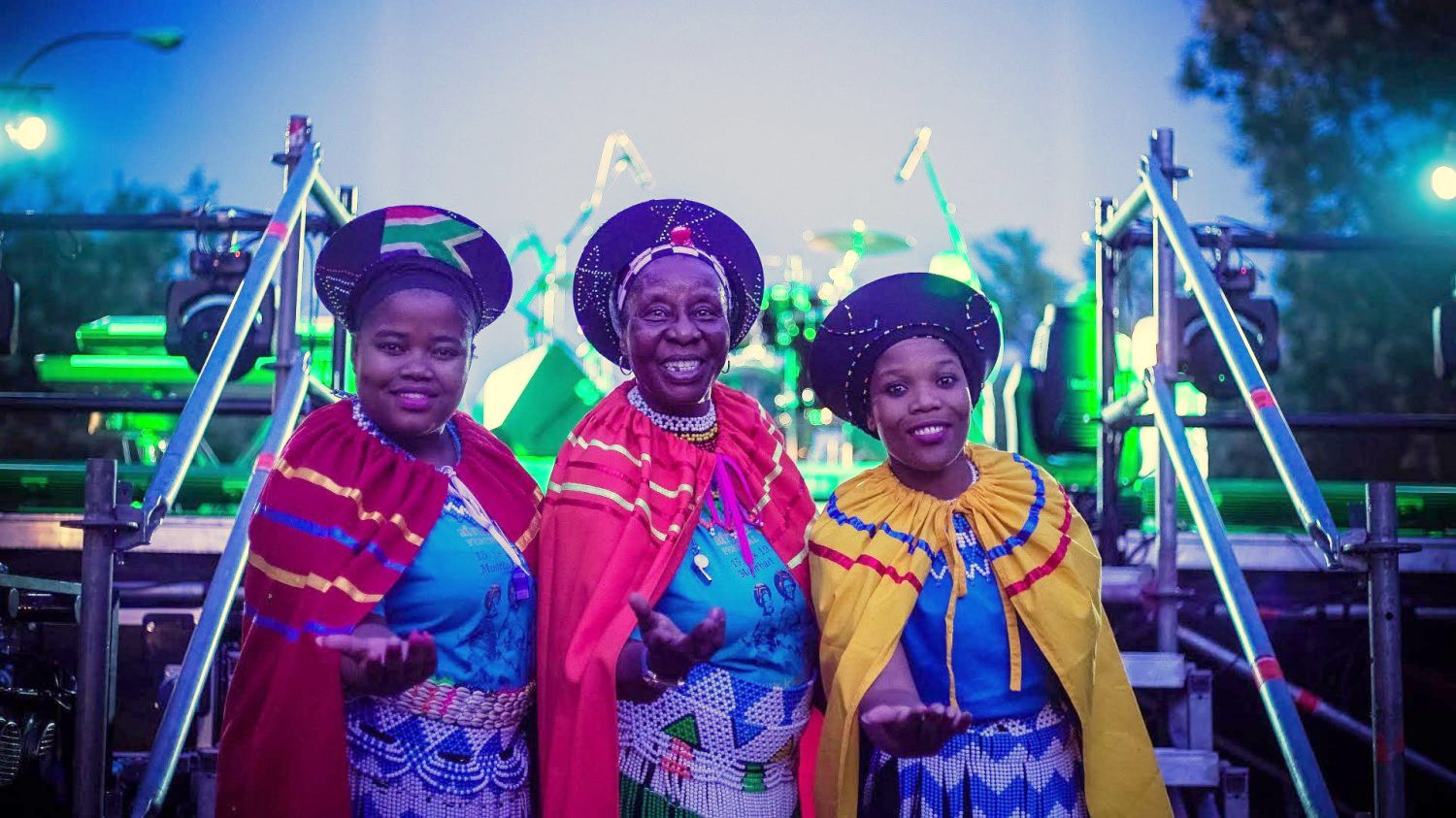 Los Veranos de la Villa 2017 tuvieron ayer domingo, 16 de julio, una jornada con actividad doble. Por un lado, una carrera y la actuación del legendario grupo sudafricano The Mahotella Queens homenajearon la figura de Nelson Mandela, dos días antes del Día Internacional que conmemora su nacimiento, que se celebra mañana 18 de julio.